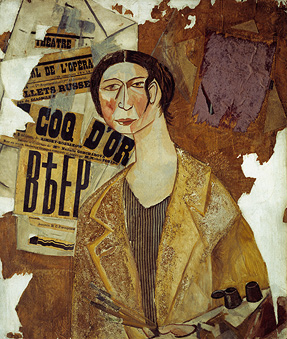 М.Ф. Ларионов. Портрет Н.С. Гончаровой. 1915. ГТГ